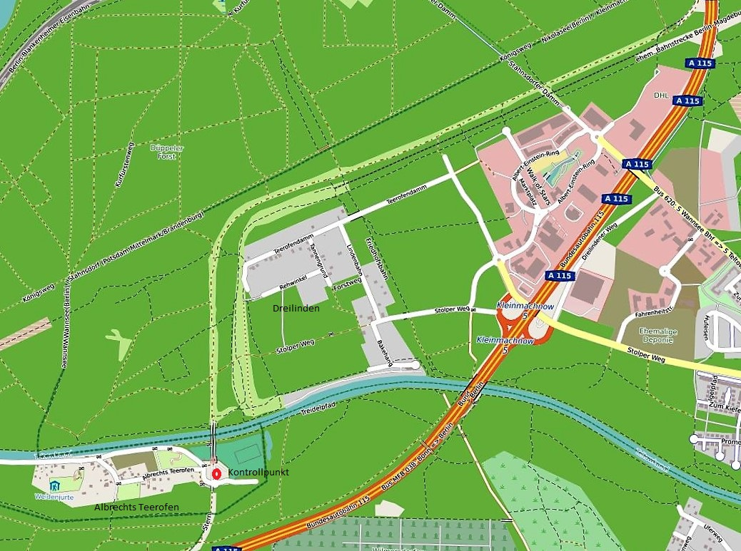 Karte der alten Autobahn (hellgrünes Band im Wald) um den Kontrollpunkt Dreilinden (unten, rot markiert) im Vergleich zur neuen A115 Karte erstellt auf Basis von Open Street Maps